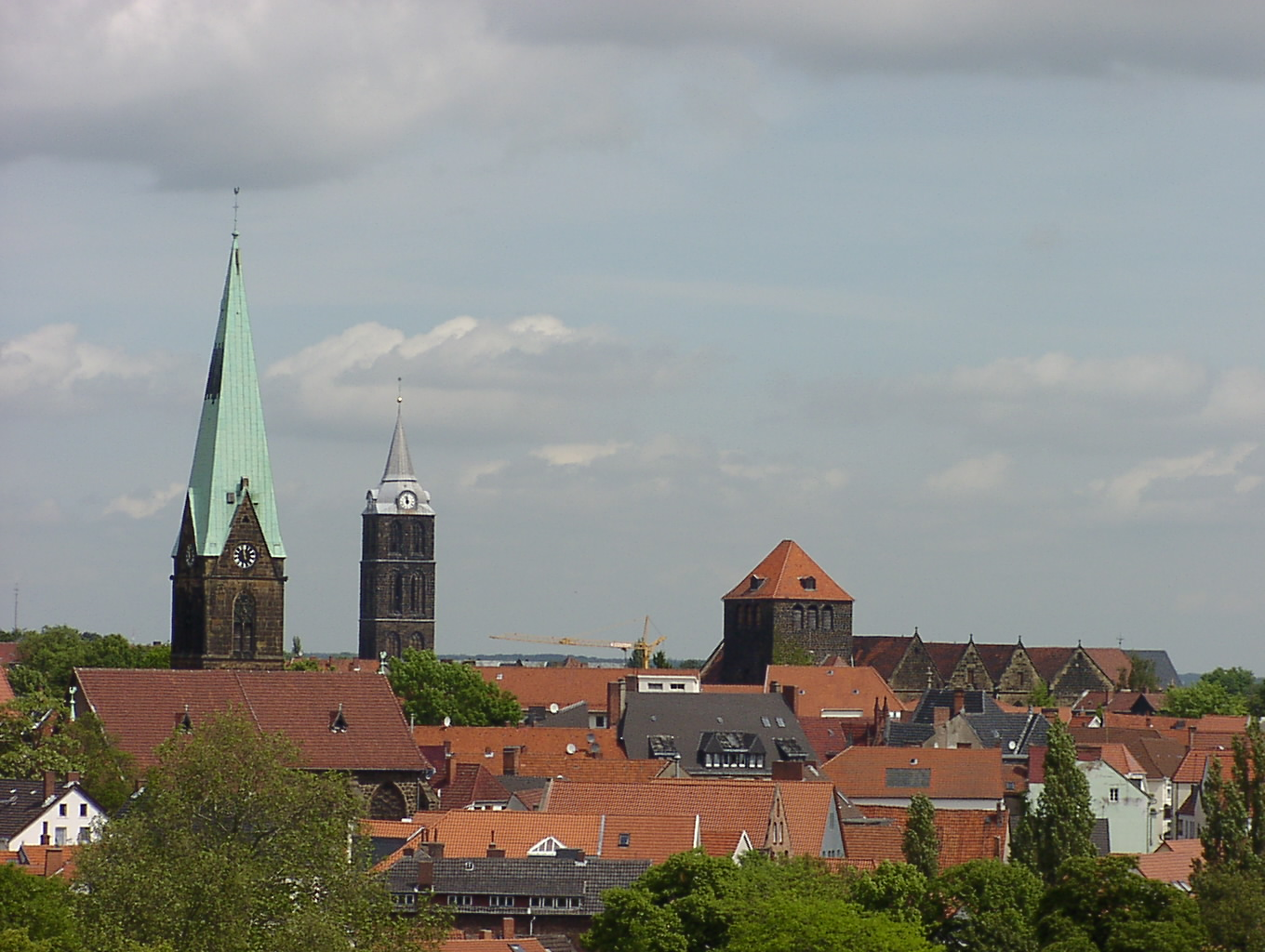 Minden, Nordrhein-Westfalen: Blick auf St. Simeonis (links, grünes Turmdach), St. Marien (Mitte, graues Turmdach) und St. Martini (rechts, rotes Turmdach).